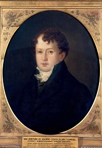 Retrato de Ortuño de Aguirre-Zuazo y Corral (1767-1811), VI marques de Montehermoso, conde de Triviana.